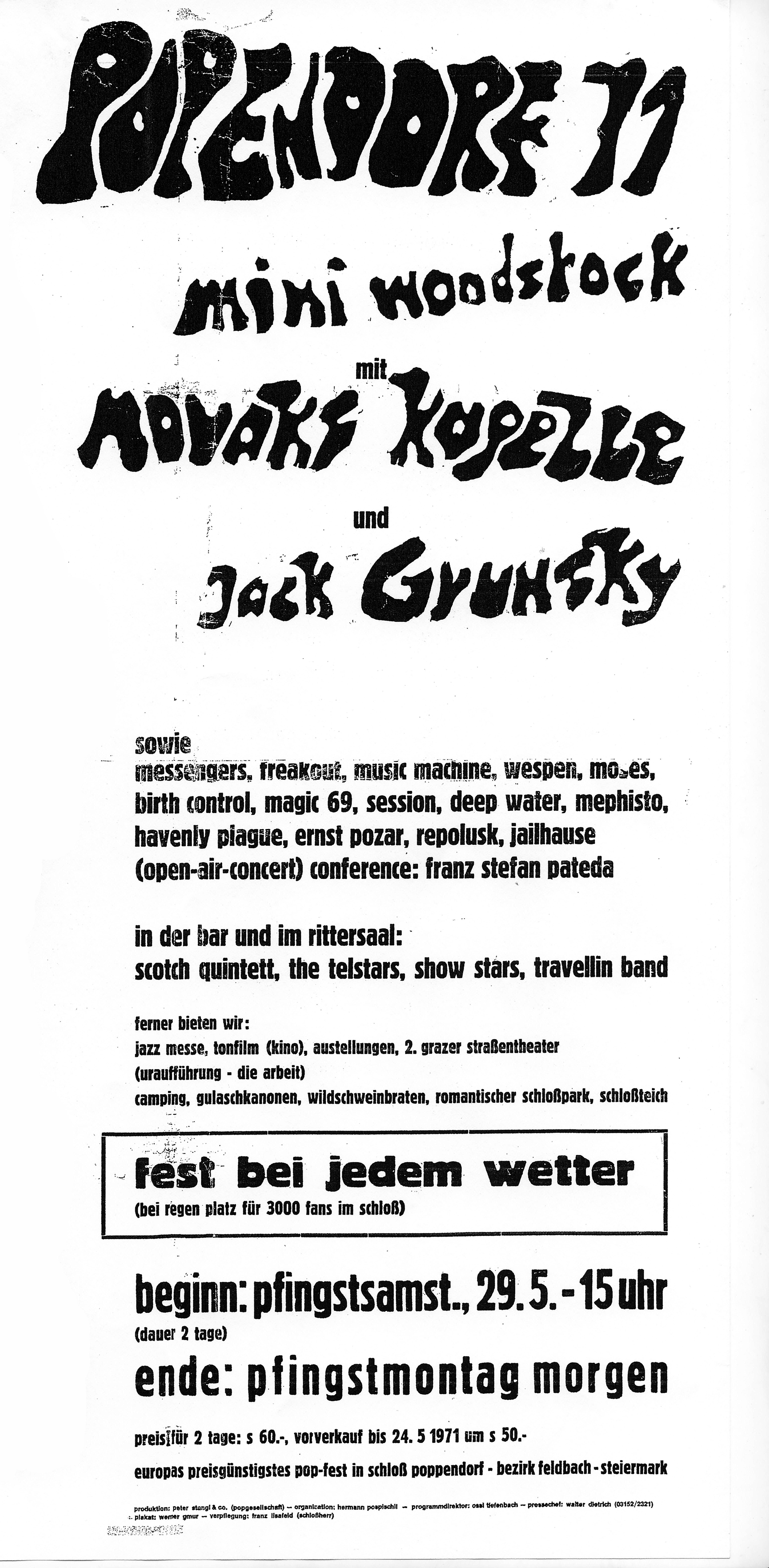 Plakat (Ausschnitt) zum Musikfestival Popendorf 71 bei Schloss Poppendorf in der Oststeiermark